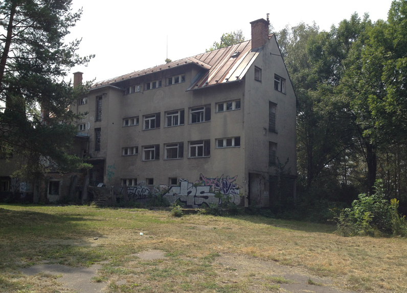 Liečebňa na Borovej hore vo Zvolene